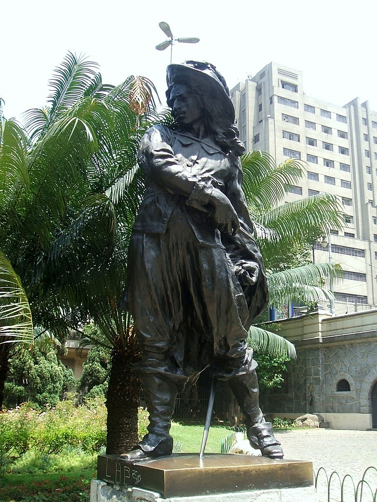 Salvator Rosa, obra de Luigi Brizzolara no conjunto escultórico do Monumento a Carlos Gomes, na Praça do Patriarca, São Paulo, Brasil